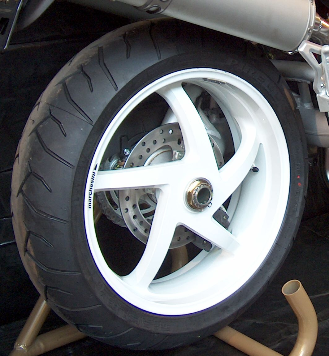 Wheel